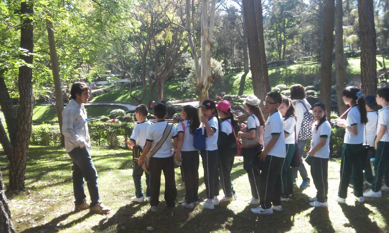 Visita al Jardín Japonés en un recorrido guiado del área de Educación Ambiental a un grupo de alumnos de nivel primaria. Informes Recorridos y Campamentos: .